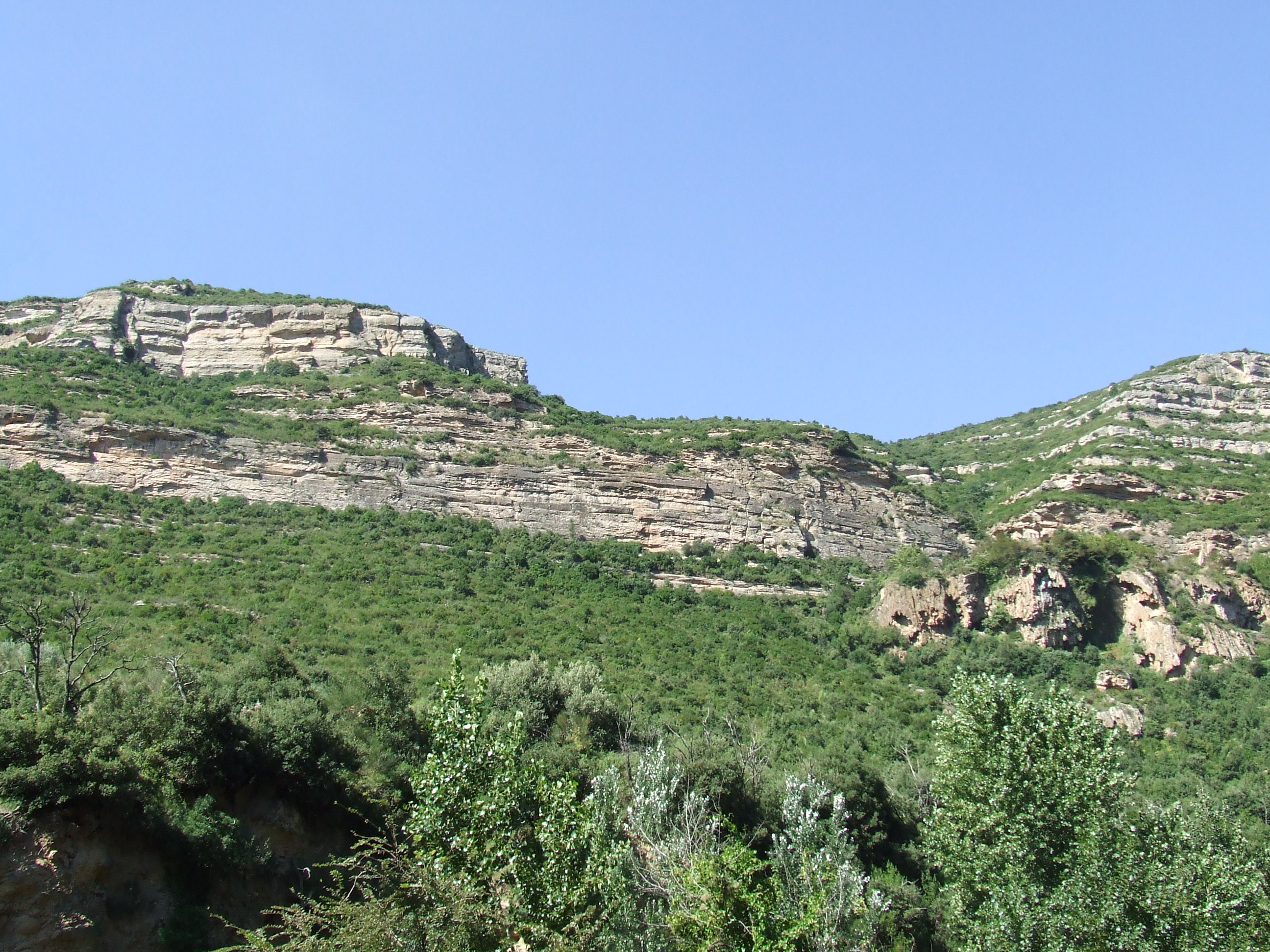 Cingles del Perer (Riells del Fai, Bigues i Riells, Vallès Oriental)